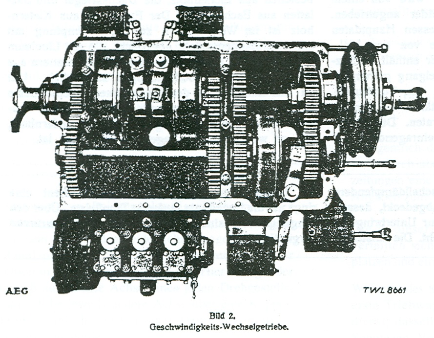 Schnittdarstellung des Triebwagengetriebes der NAG